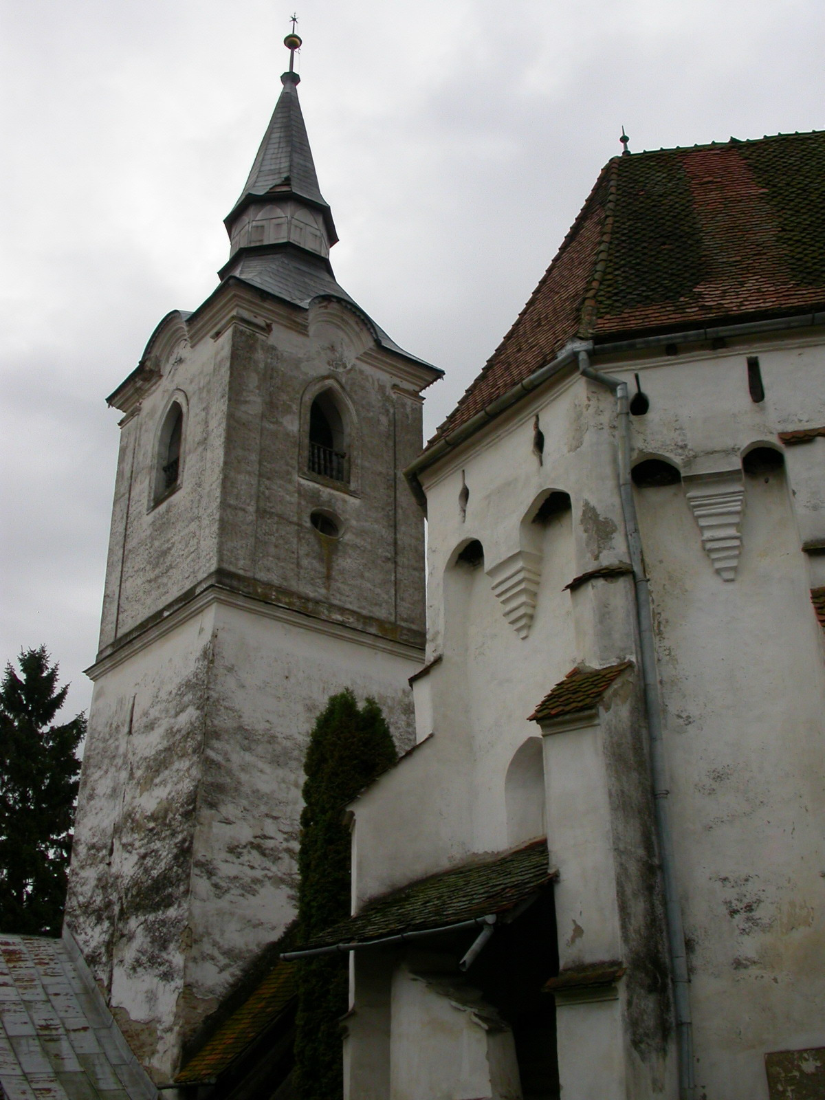 Ansamblul bisericii unitariene fortificate, sec. XV - XVIII